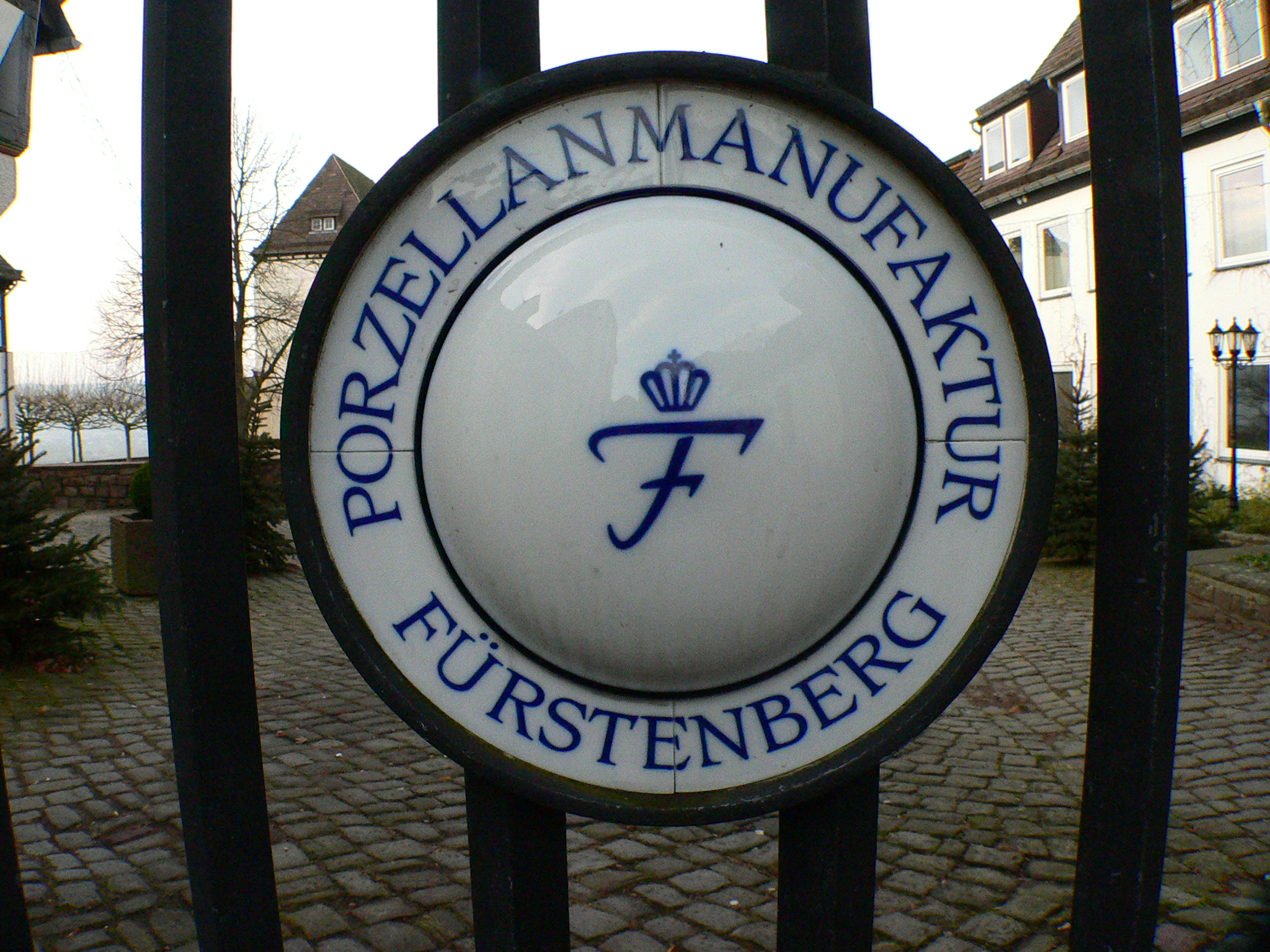 Schild am Eingang zur Porzellanmanufaktur Fürstenberg (Weser)